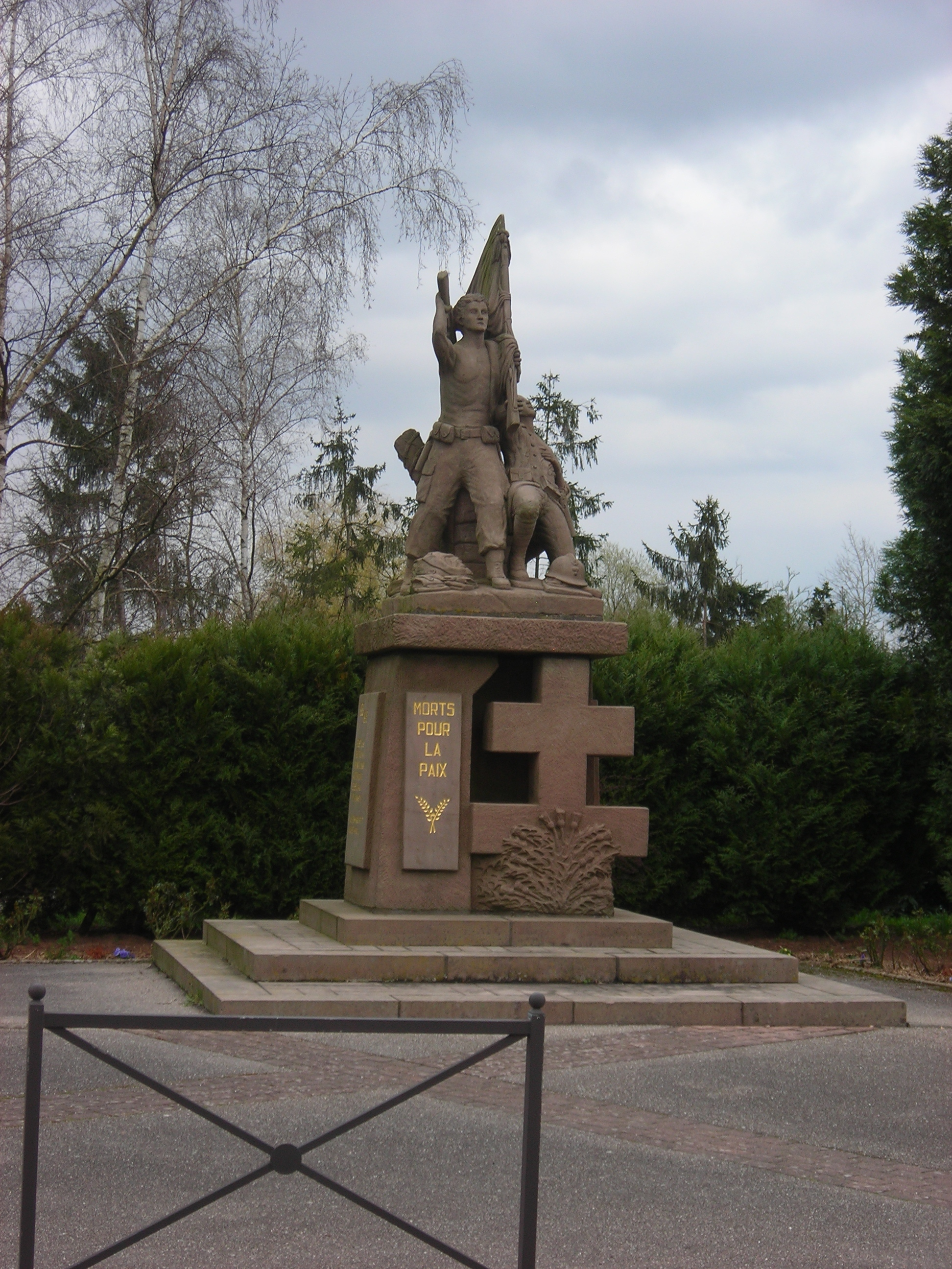 Monument aux morts à Varsberg